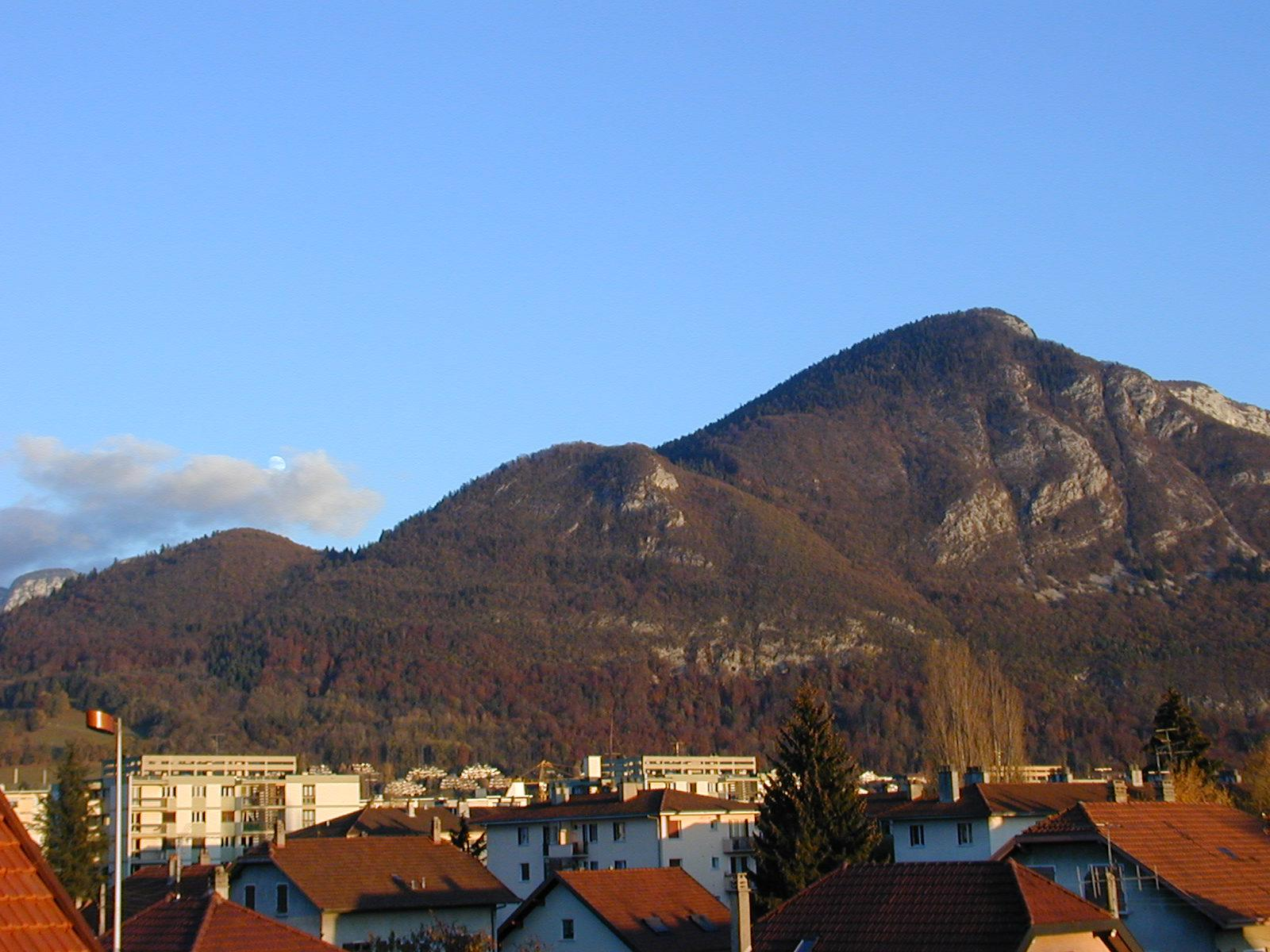 De gauche à droite : le mont Rampignon (894 m), le mont Rampon (957 m) et le mont Veyrier (1291 m), dominent les quartiers des Pommaries et des Barattes à Annecy-le-Vieux, Haute-Savoie, France.